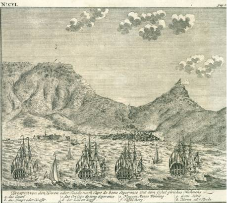 Prospect von den Haven oder Reede nach Capo de bone Esperance und dem Castel Gleiches Nahmens Key: .